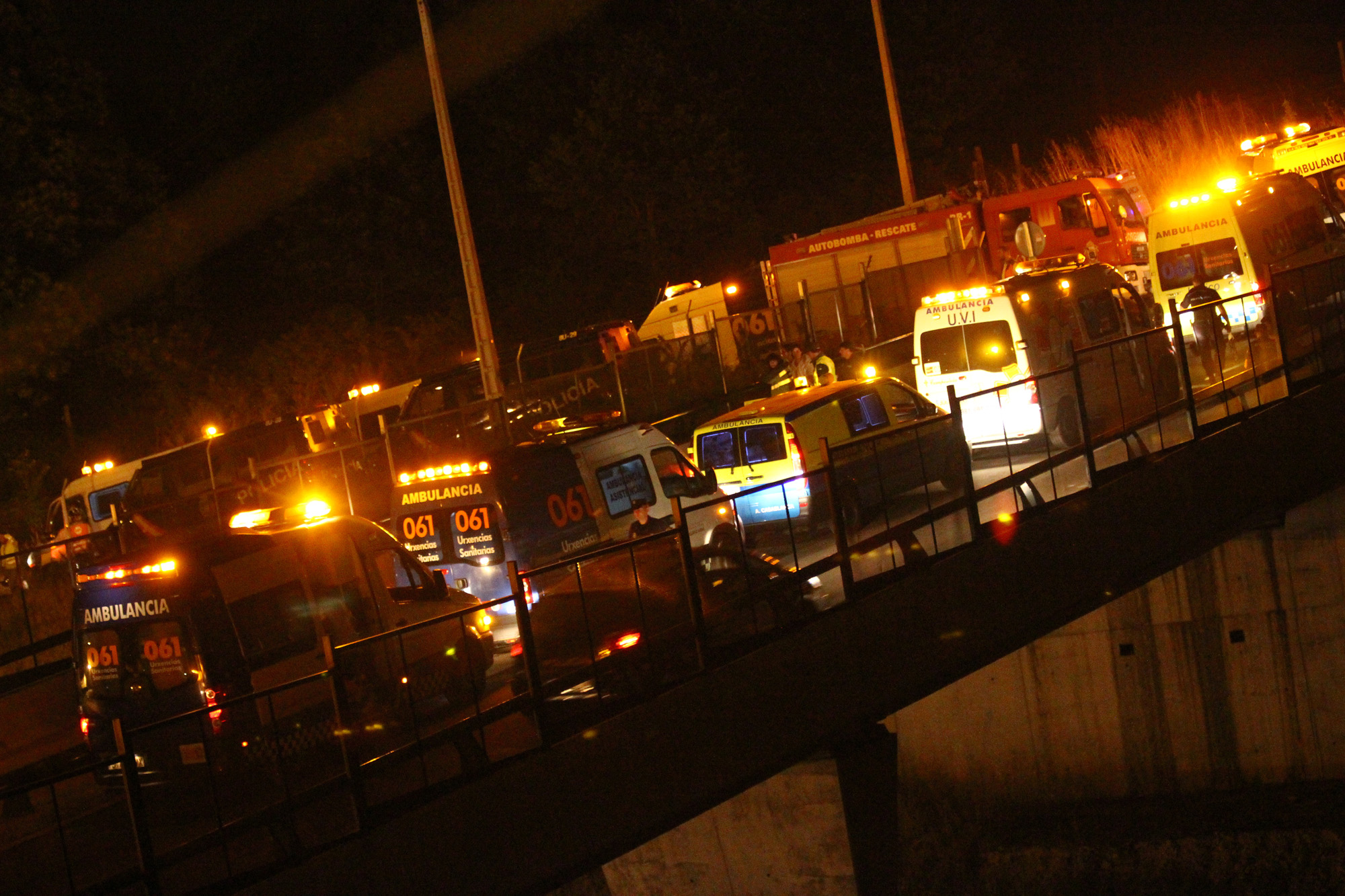 Fotos que hice in situ del accidente ferroviario ocurrido este 24 de julio cerca de Santiago de Compostela. En el momento de escribir estas líneas ya se cuentan 65 muertos. Es el peor accidente ferroviario de España en los últimos 40 años. Tragedy in Santiago de Compostela Photos I made on-site of the train crash on July 24 near Santiago de Compostela. At the time of writing are counted 65 dead. It is the worst rail accident in Spain in the last 40 years.